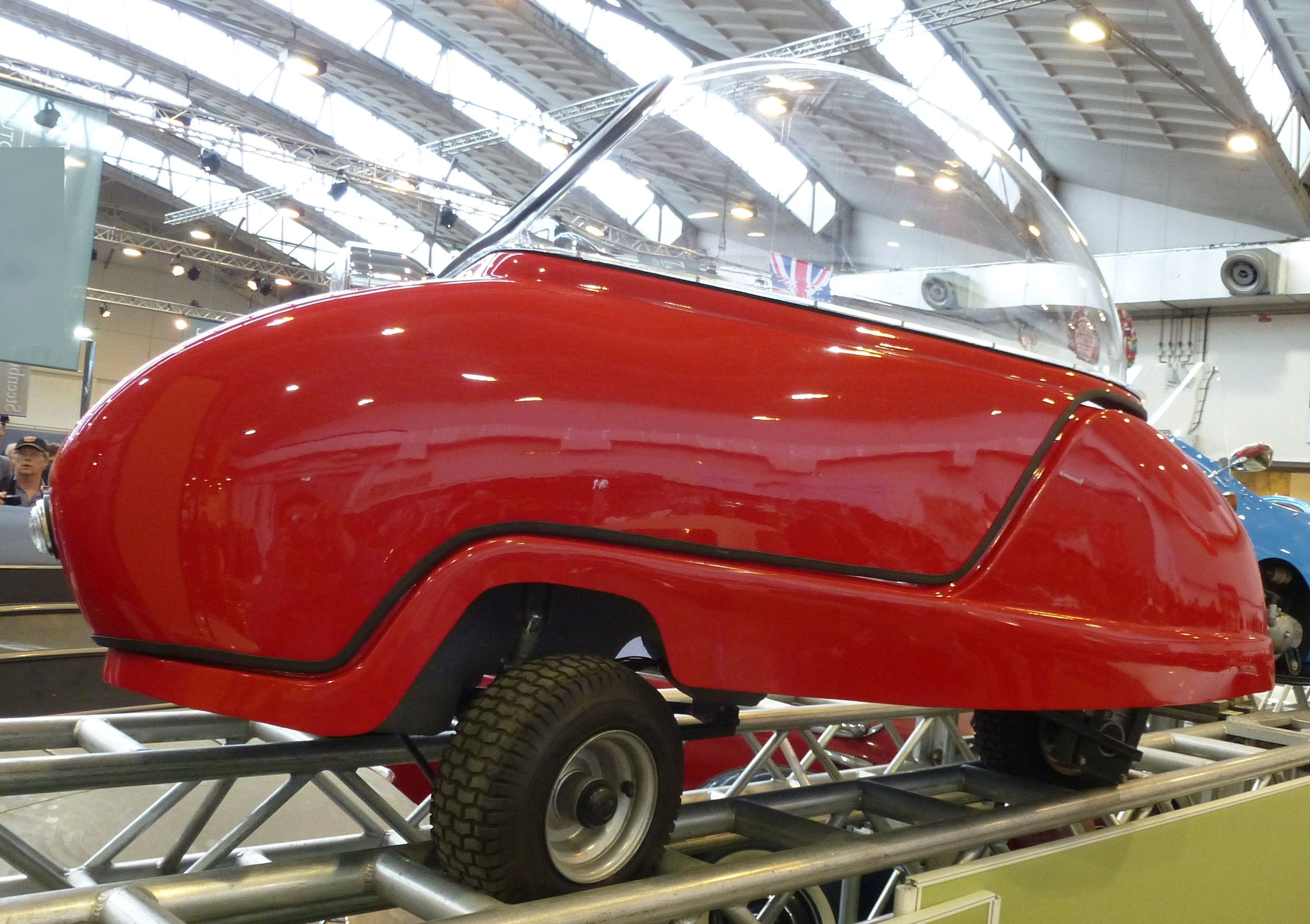 Peel Engineering Trident 2017 (Elektro)